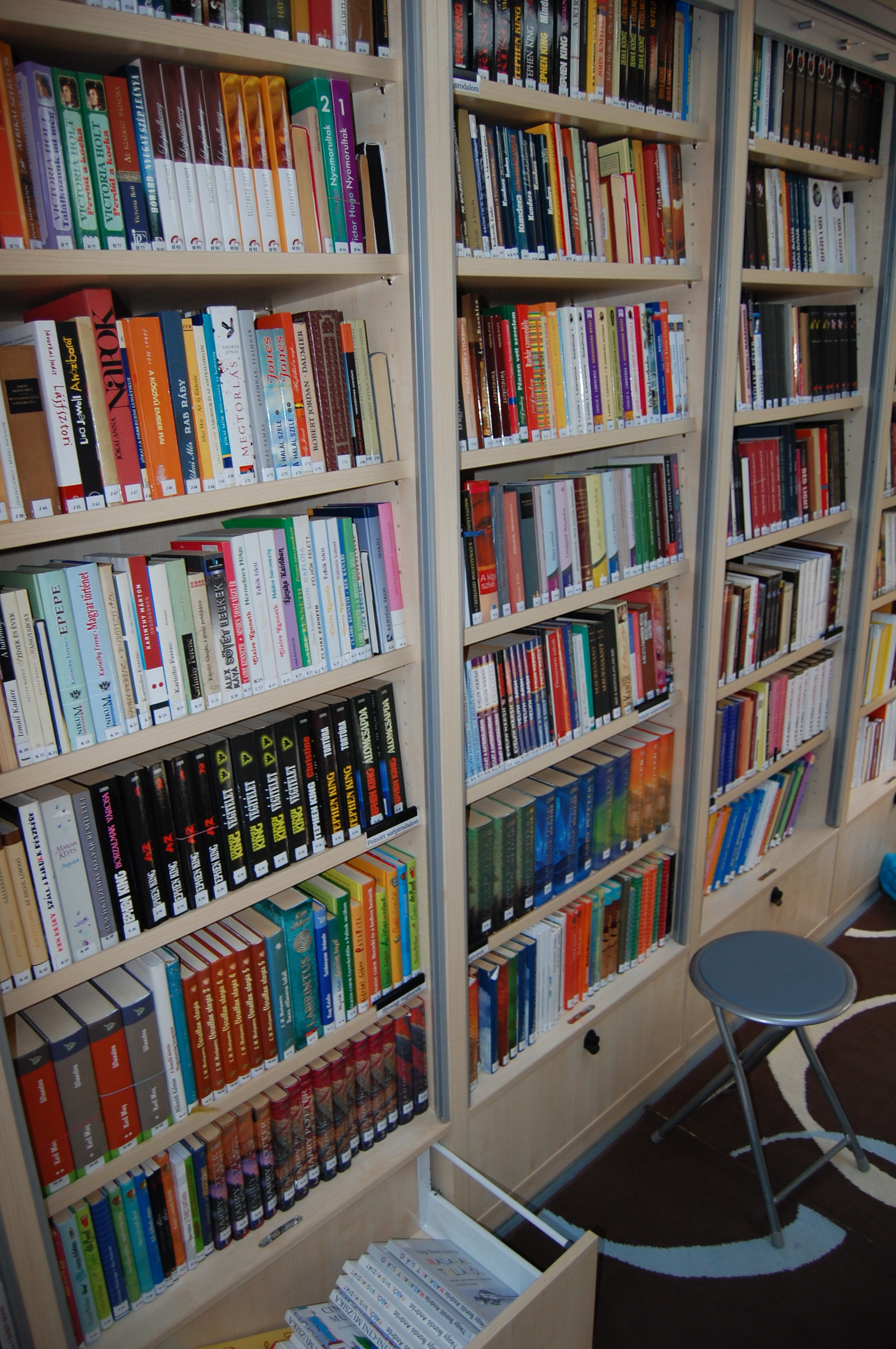 Könyvtárbusz a Baranya megyei kistérségek ellátására. A megvalósítás a TIOP-1.2.3-08/1-2008-0021 kódszámú projekt keretében történt. Ellátást működteti: Csorba Győző Megyei-Városi Könyvtár - Pécs, Dél-dunántúli Regionális Könyvtár és Tudásközpont.